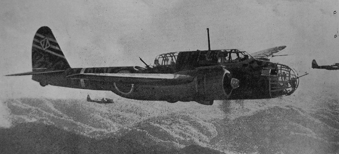 飛行第34連隊所属の、川崎 九九式双発軽爆撃機（キ48）